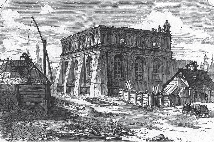 Синагога в Жолкве на рисунке 1870 г. Яна Матейко.